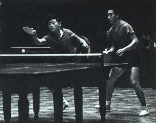 1965-01 徐寅生 庄则栋